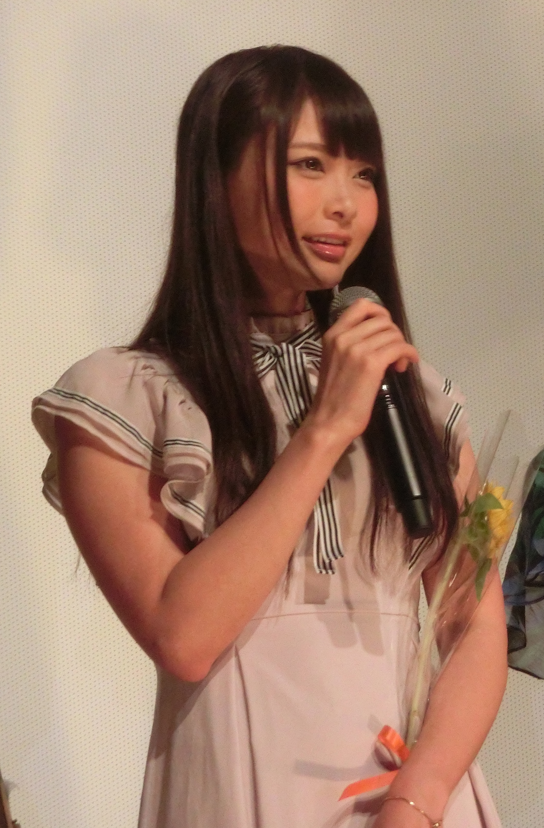 テアトル新宿「アノコノシタタリ」舞台挨拶 2019年8月31日